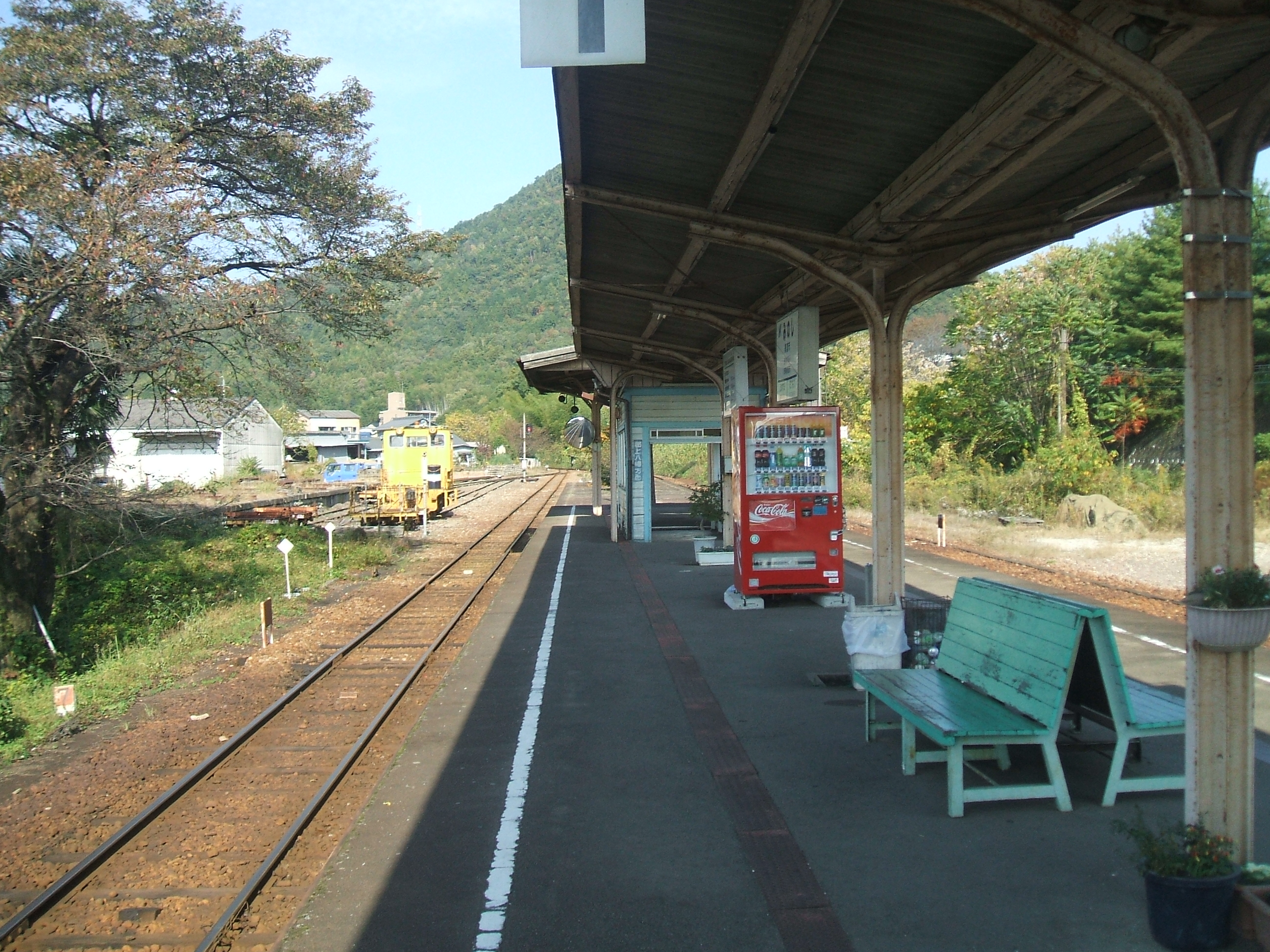 美濃市駅ホームの様子